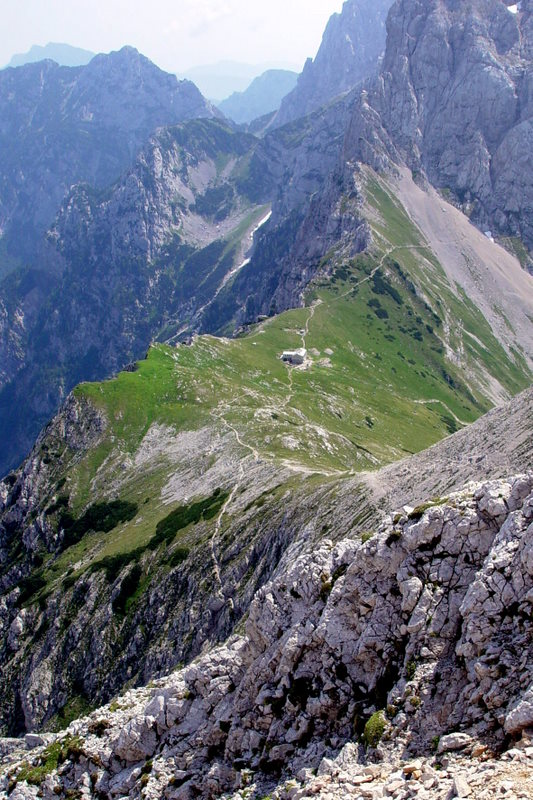 Pogled na Kamniško sedlo s poti proti Brani.